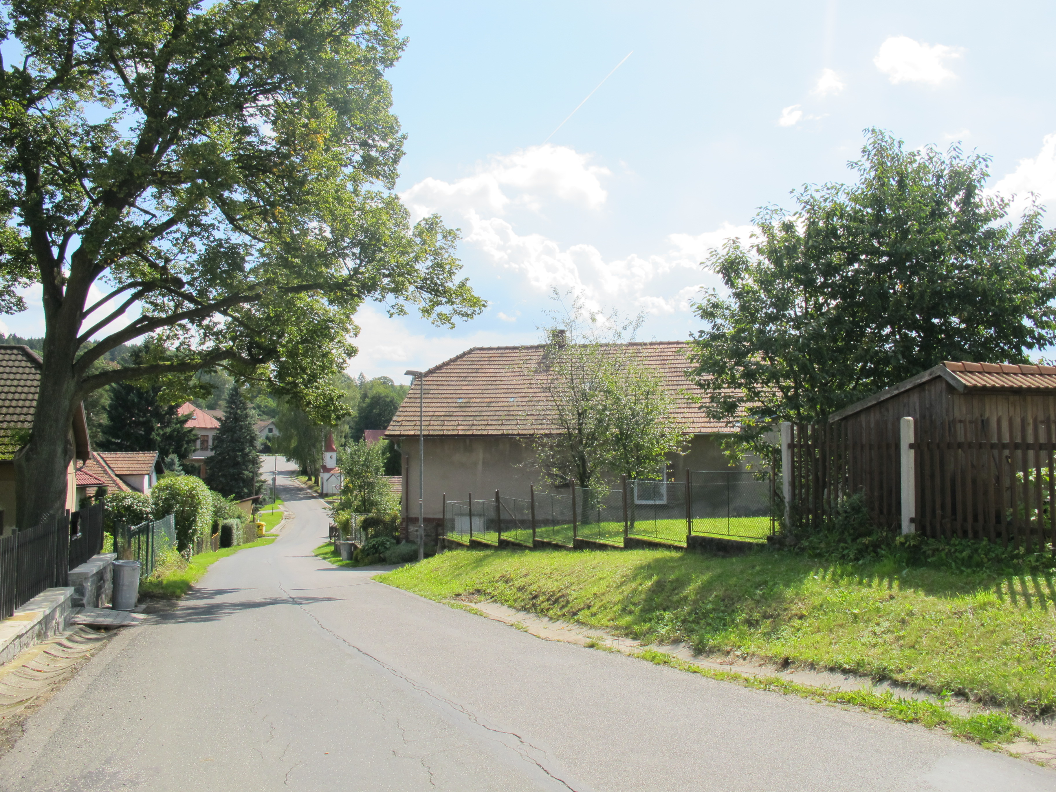 Klokočov